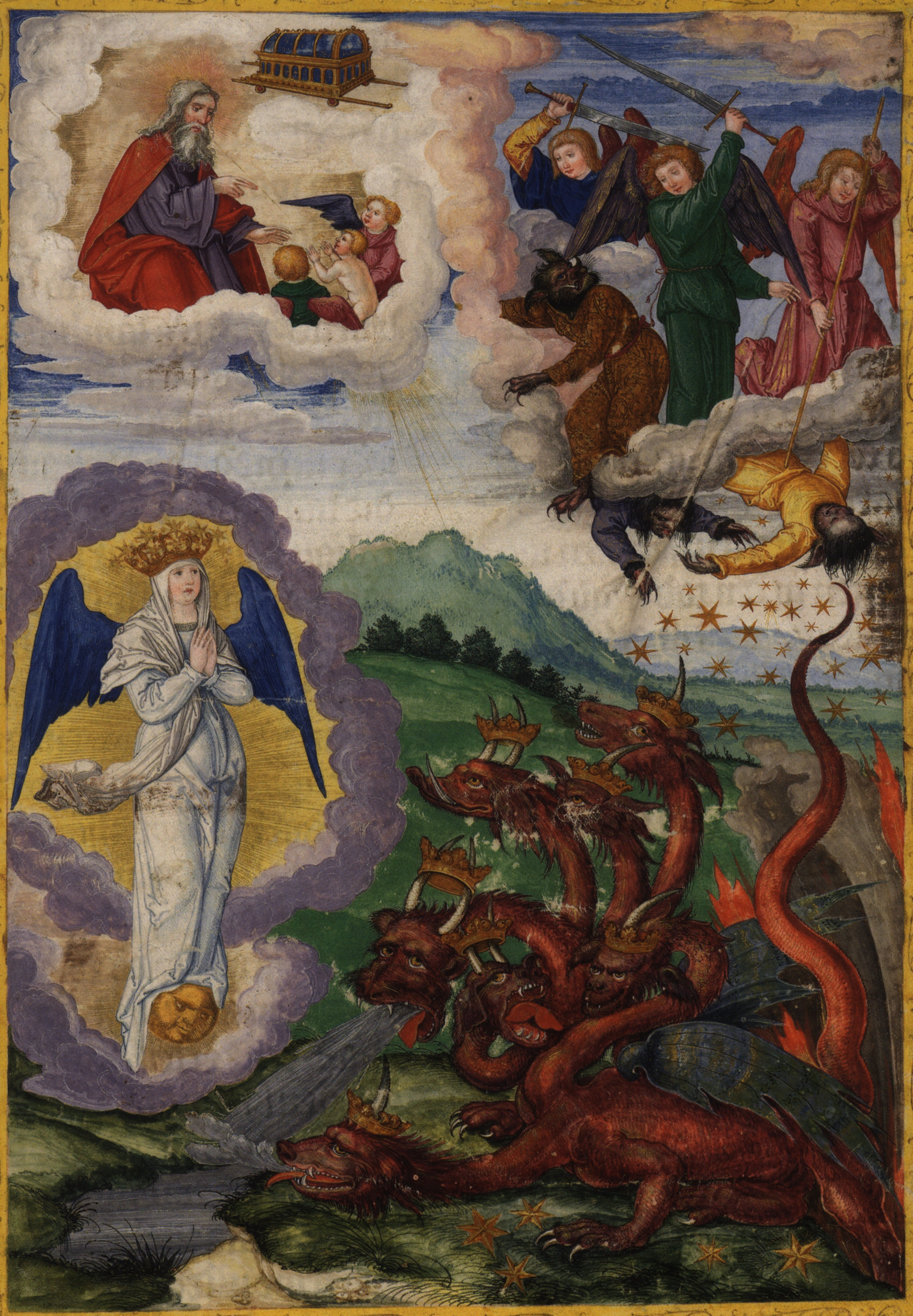 Blatt 295r: Das Apokalyptische Weib, Offb 12,1-18